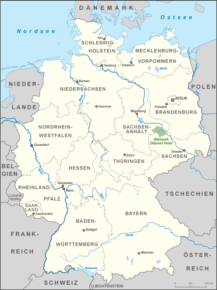 Karte des Naturparks Dübener Heide in Deutschland